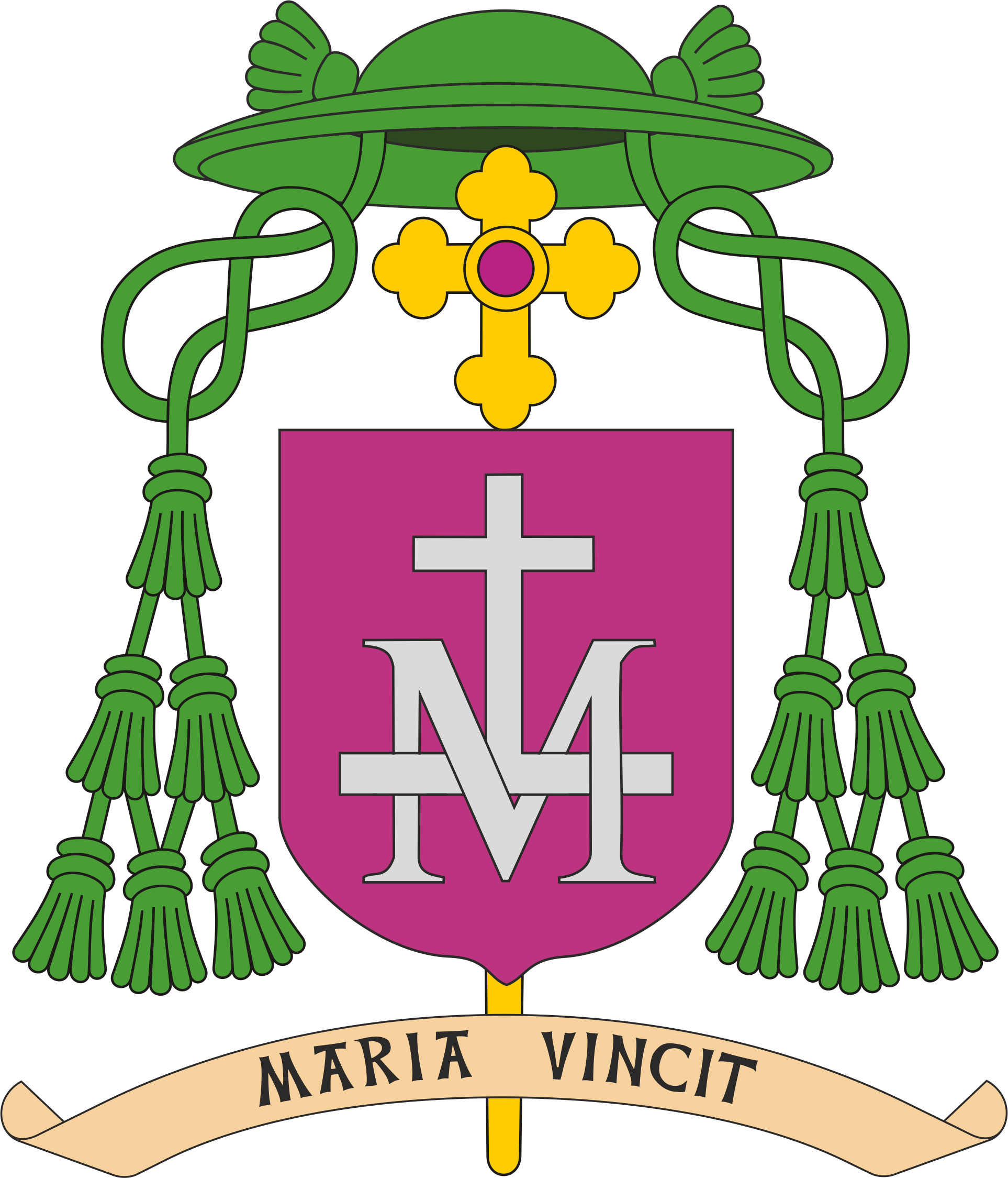 Herb bpa Zbigniewa Kraszewskiego